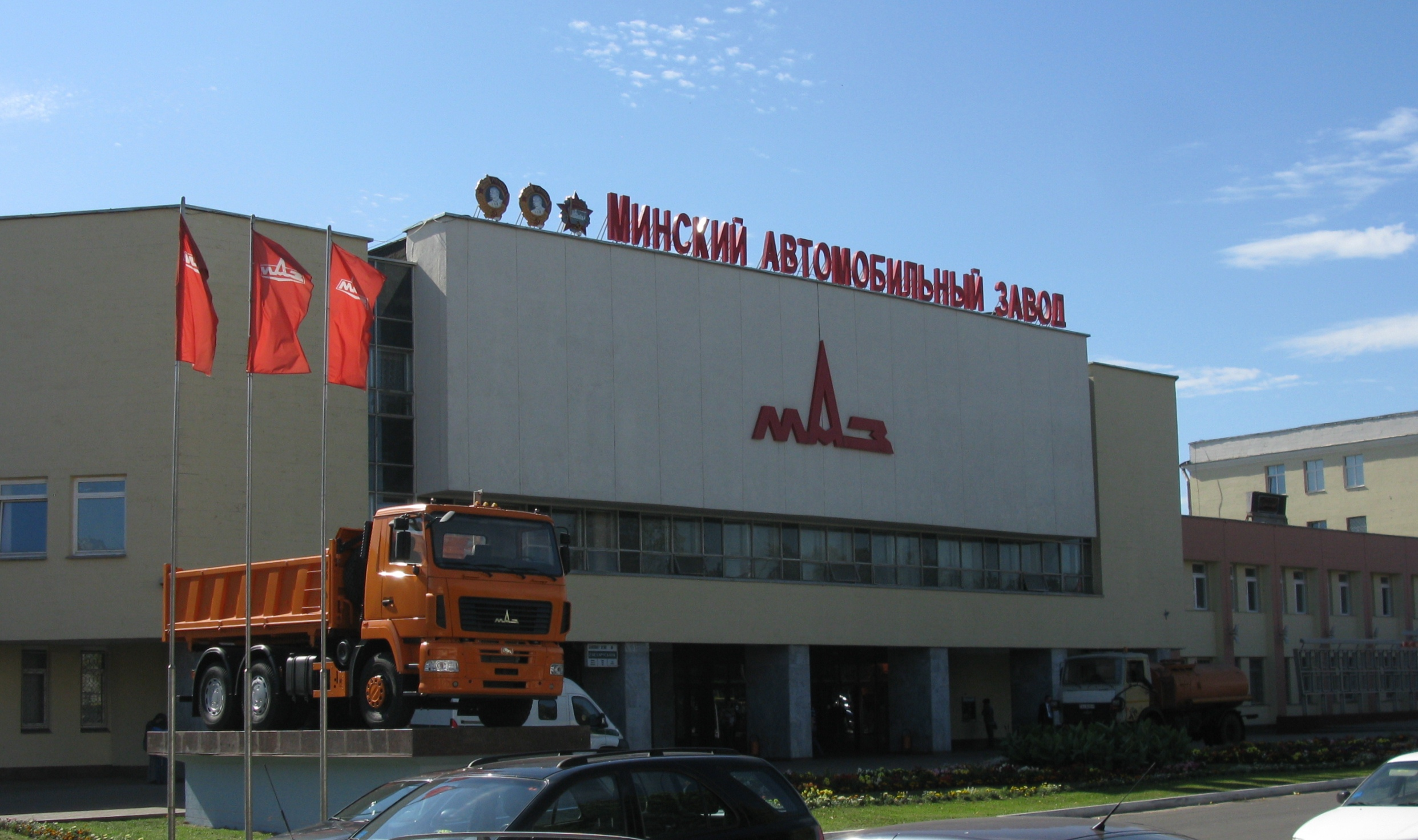 Вид проходной Минского Автомобильного Завода (ул. Социалистическая, 2) со стороны Минского Государственного Автомеханического Колледжа. Минск, Беларусь.